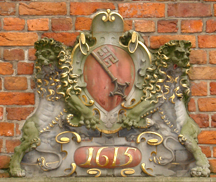 Stadtwaage Bremen: Bremer Staatswappen. Herstellung: 1615 Das abgebildete Objekt ist ein geschütztes Kulturdenkmal in der Freien Hansestadt Bremen, mit der Nr. 0831,T004 beim Landesamt für Denkmalpflege registriert.